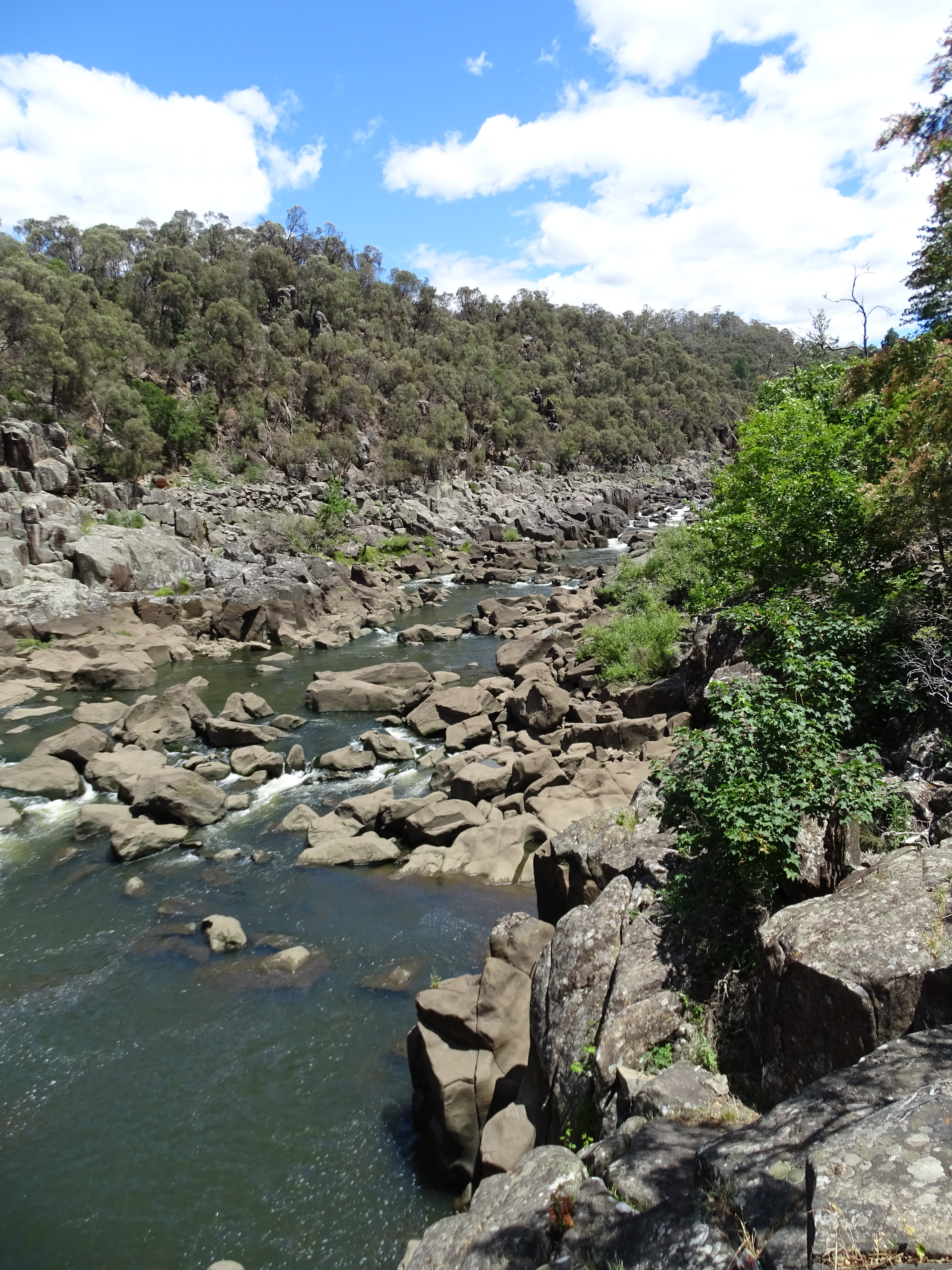 Teilansicht auf Cataract Gorge beim Niedrigwasser, Launceston, Tasmanien